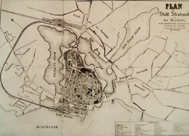 Das Bild zeigt einen Stralsunder Stadtplan von 1869 (49,2x35cm). Dieses Foto wurde aus dem Buch "Geschichte der Stadt Stralsund" von Herbert Ewe, S. 261, abfotografiert.